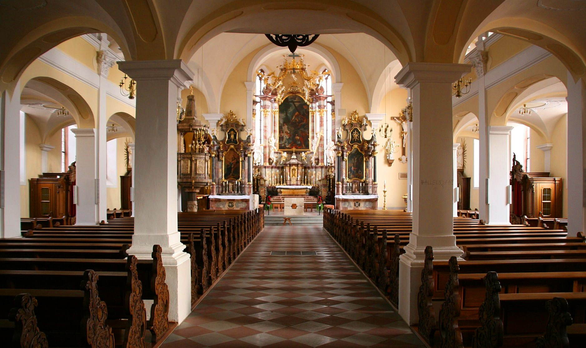 Der weitgehend barocke Innenraum der katholischen Heilig-Kreuz-Kirche in Offenburg (Ortenaukreis, Baden-Württemberg). Blick unter der Orgelempore hindurch, durch das Langhaus zum Chor.